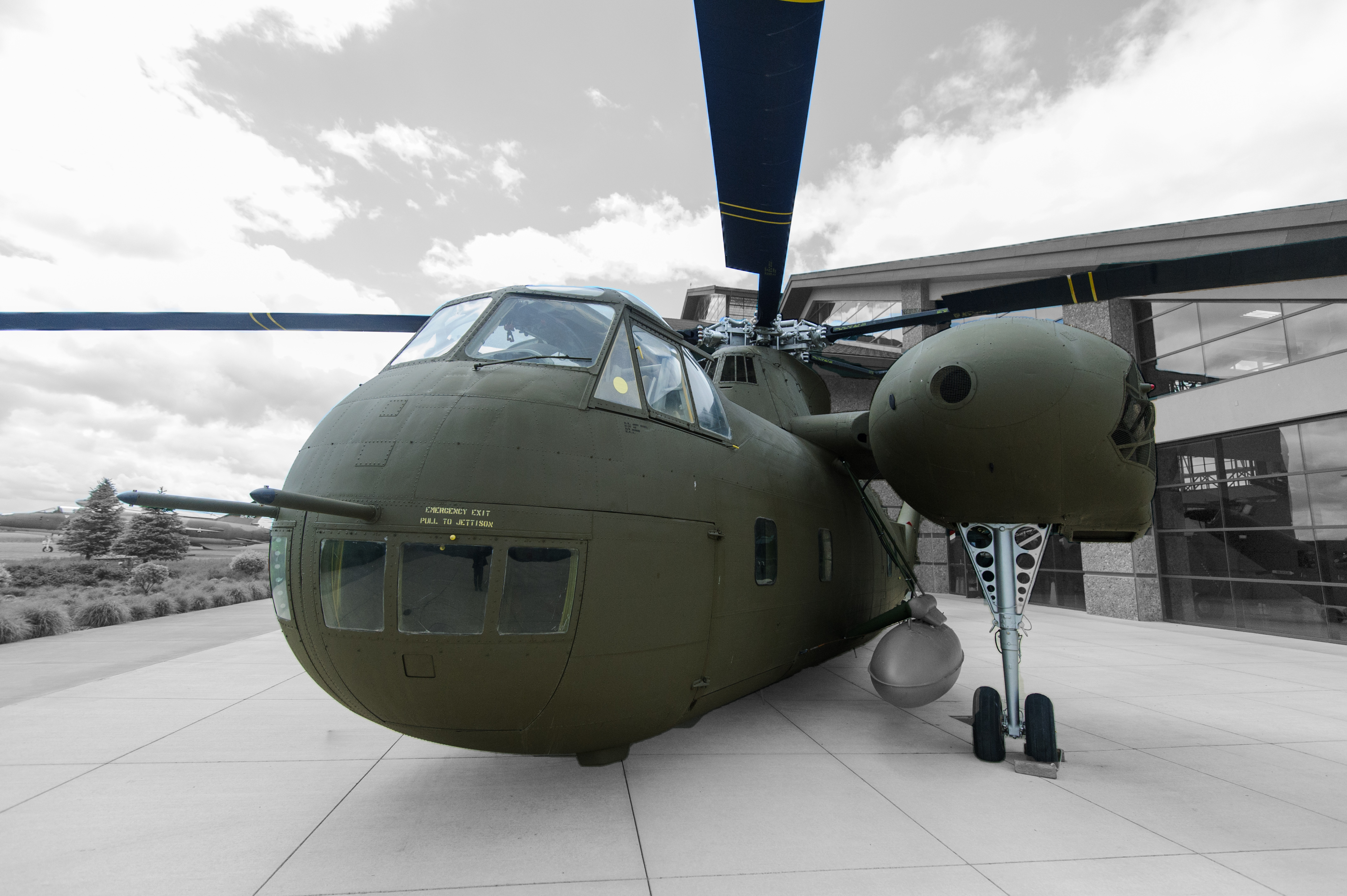 H-37 Helicopter in Evergreen Aviation Museum.